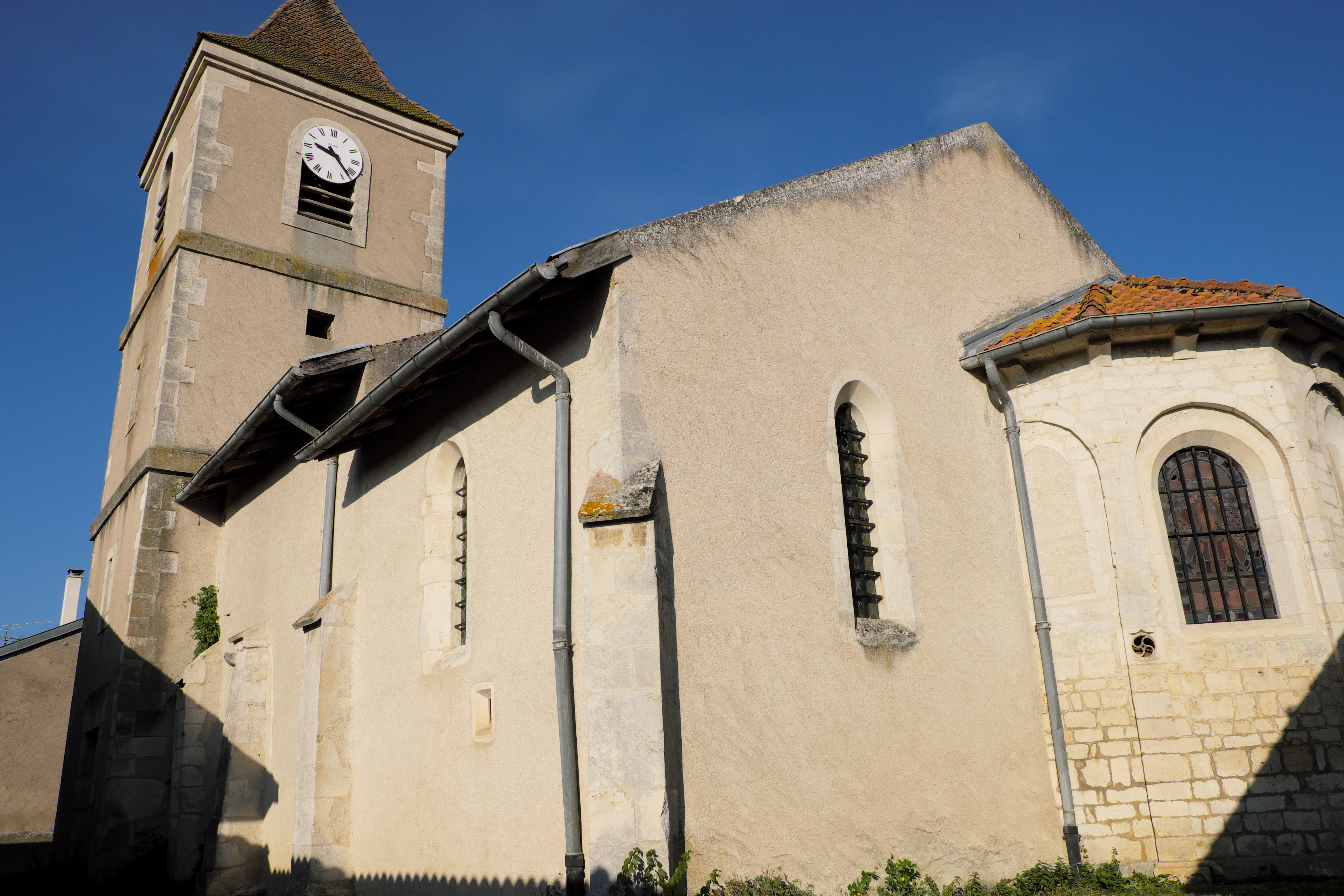 Église Saint-Lambert à Gézoncourt rn Meurthe-et-Moselle. .